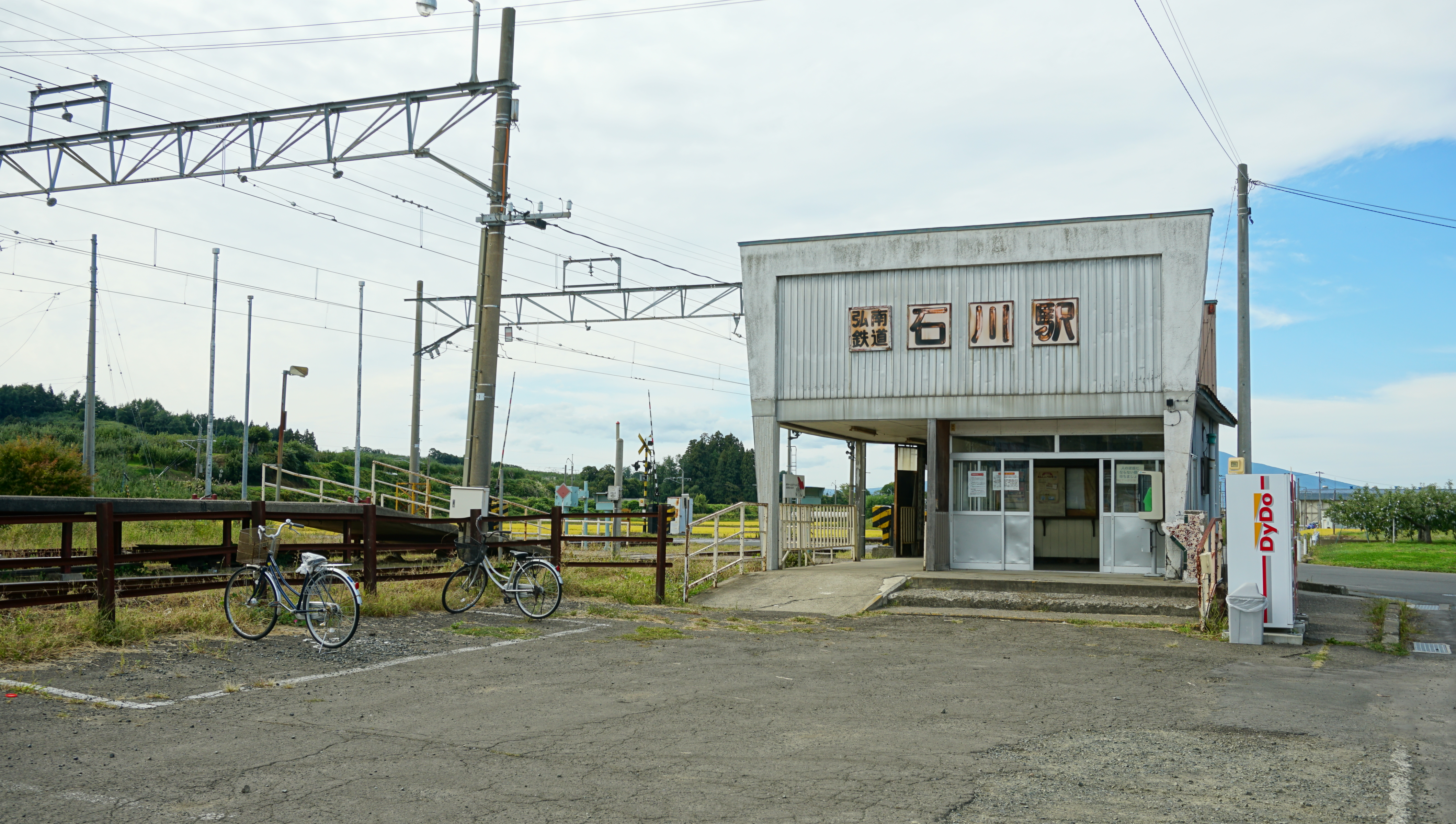 弘南鉄道大鰐線 石川駅